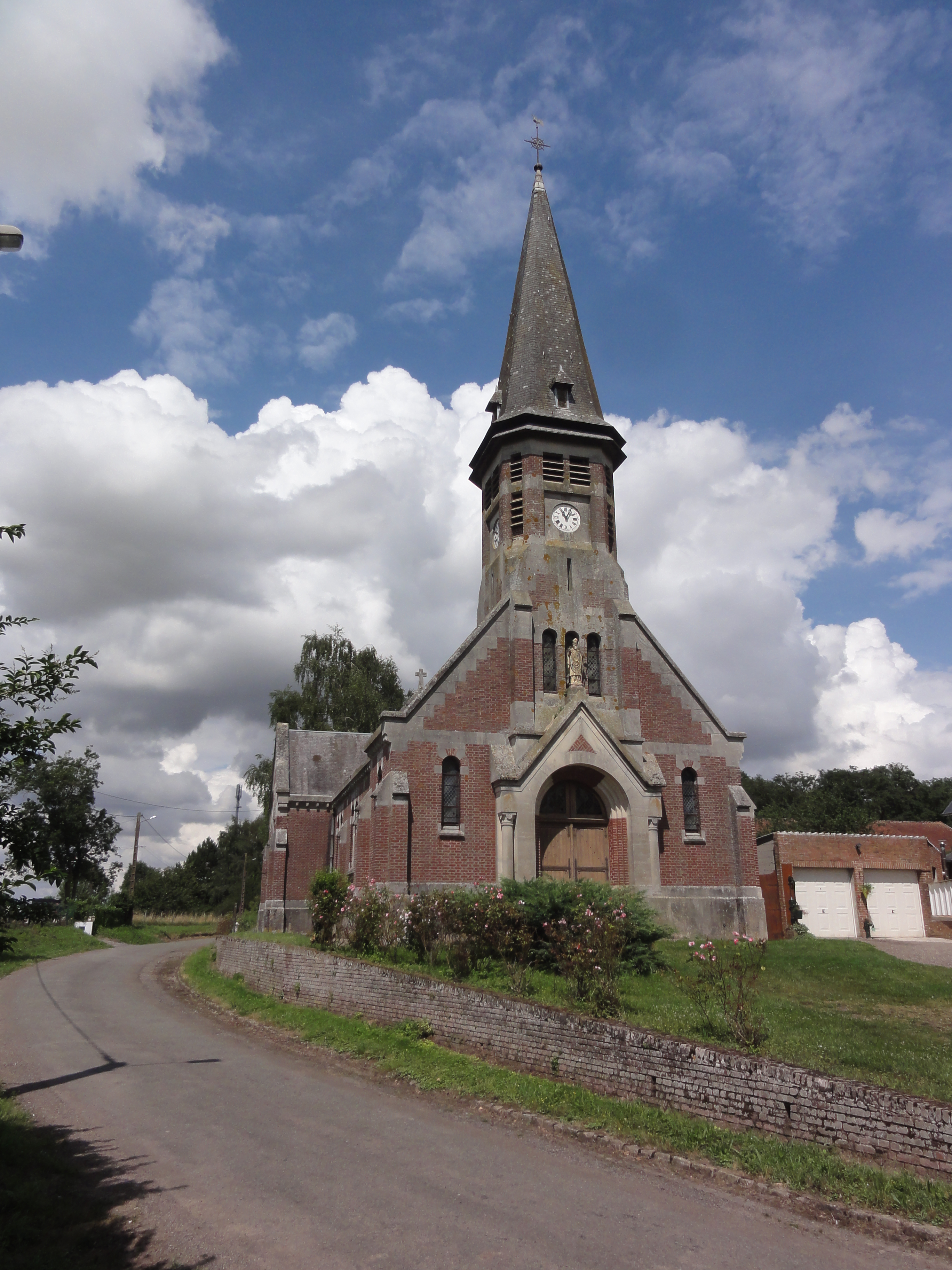 Fluquières (Aisne) église Saint-Médard